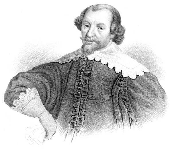 Gabriel Gustafsson Oxenstierna af Eka och Lindö (1587-1640)